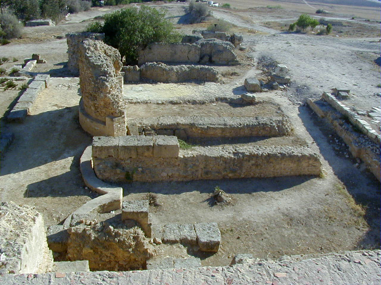 absides, flanc sud de Byrsa (Carthage)